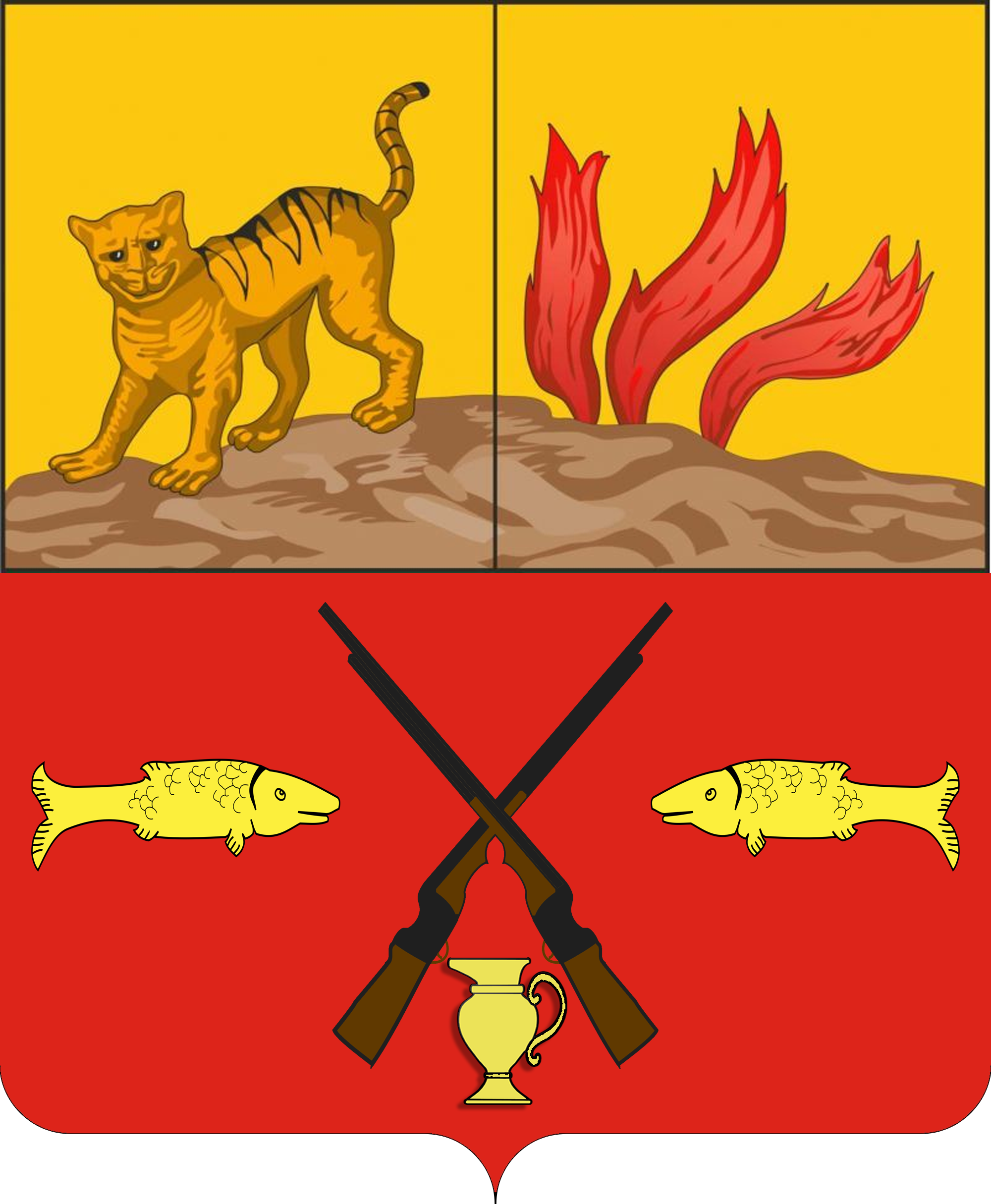 Официальный герб Шемахи ссылается на официальный сайт [1],[2] и [3]